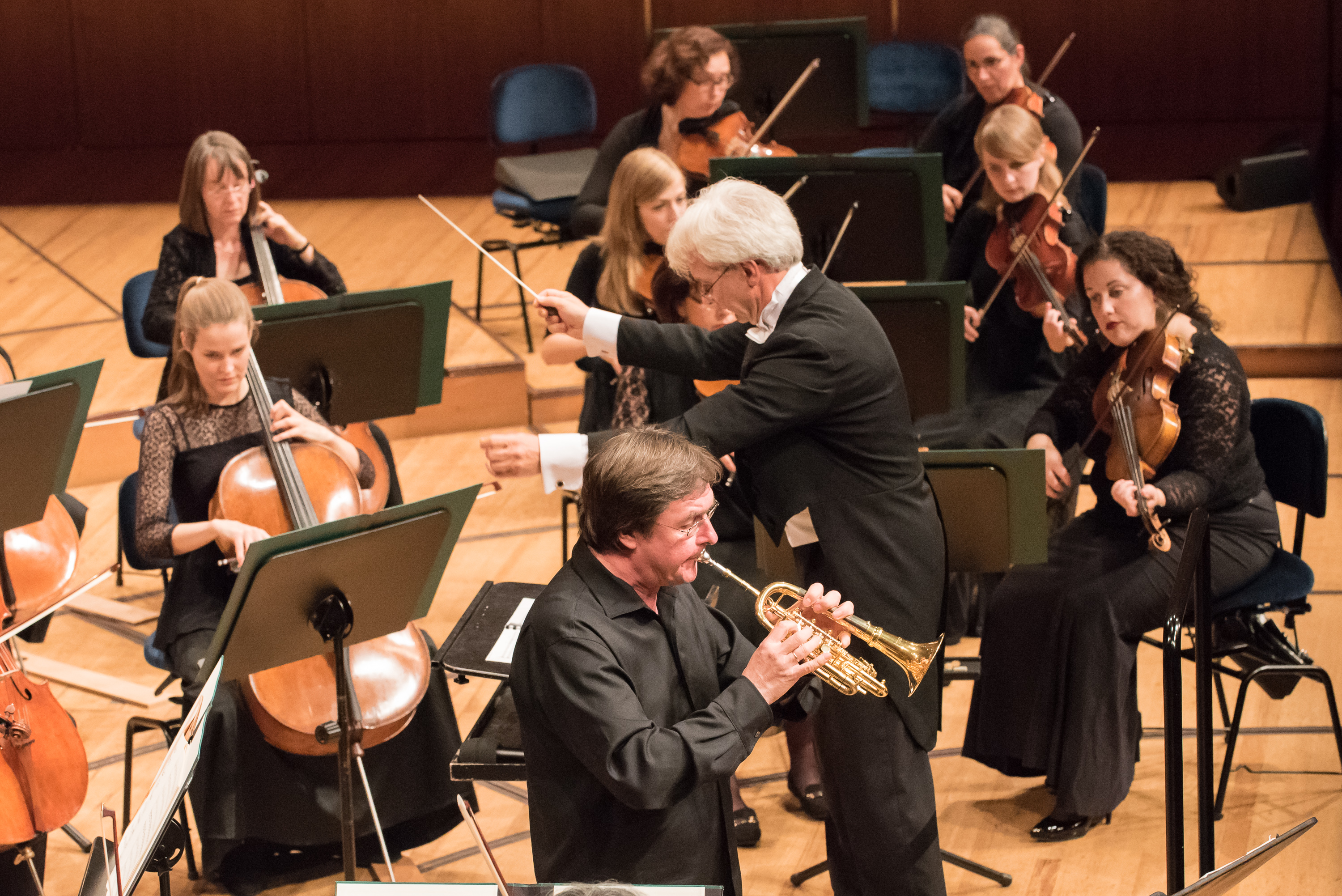 Foto vom Konzert Classical Gala, KKL Luzern 2017